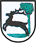 Herb Księżego Lasu (gmina Zbrosławice, powiat tarnogórski, województwo śląskie, Polska)